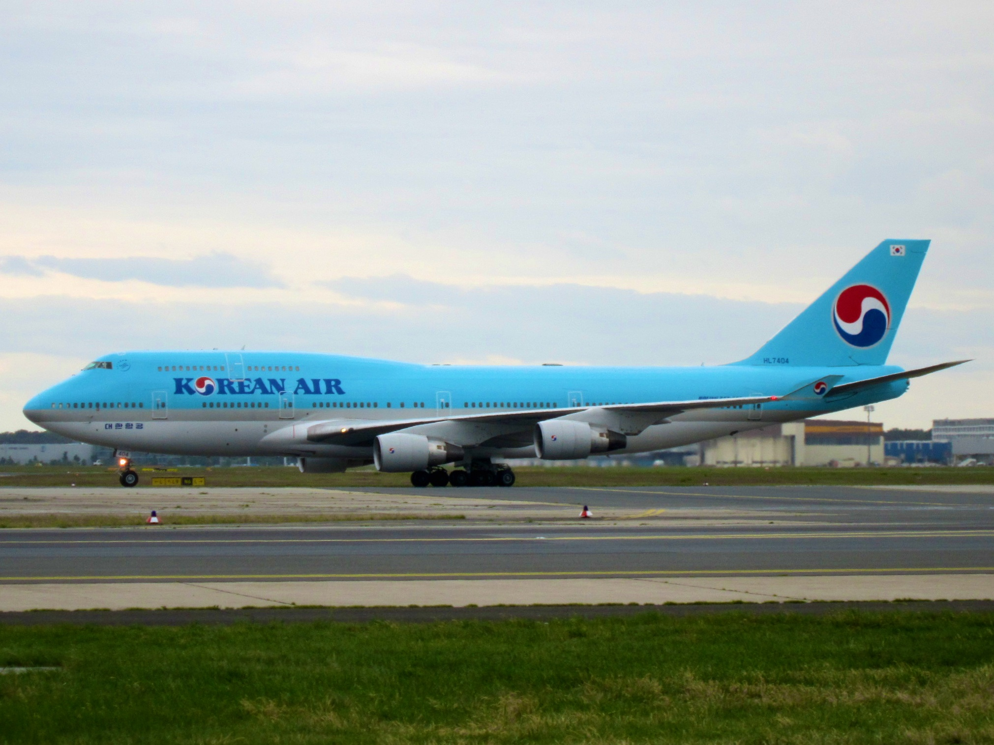 Korean Air Lines Boeing 747-4B5